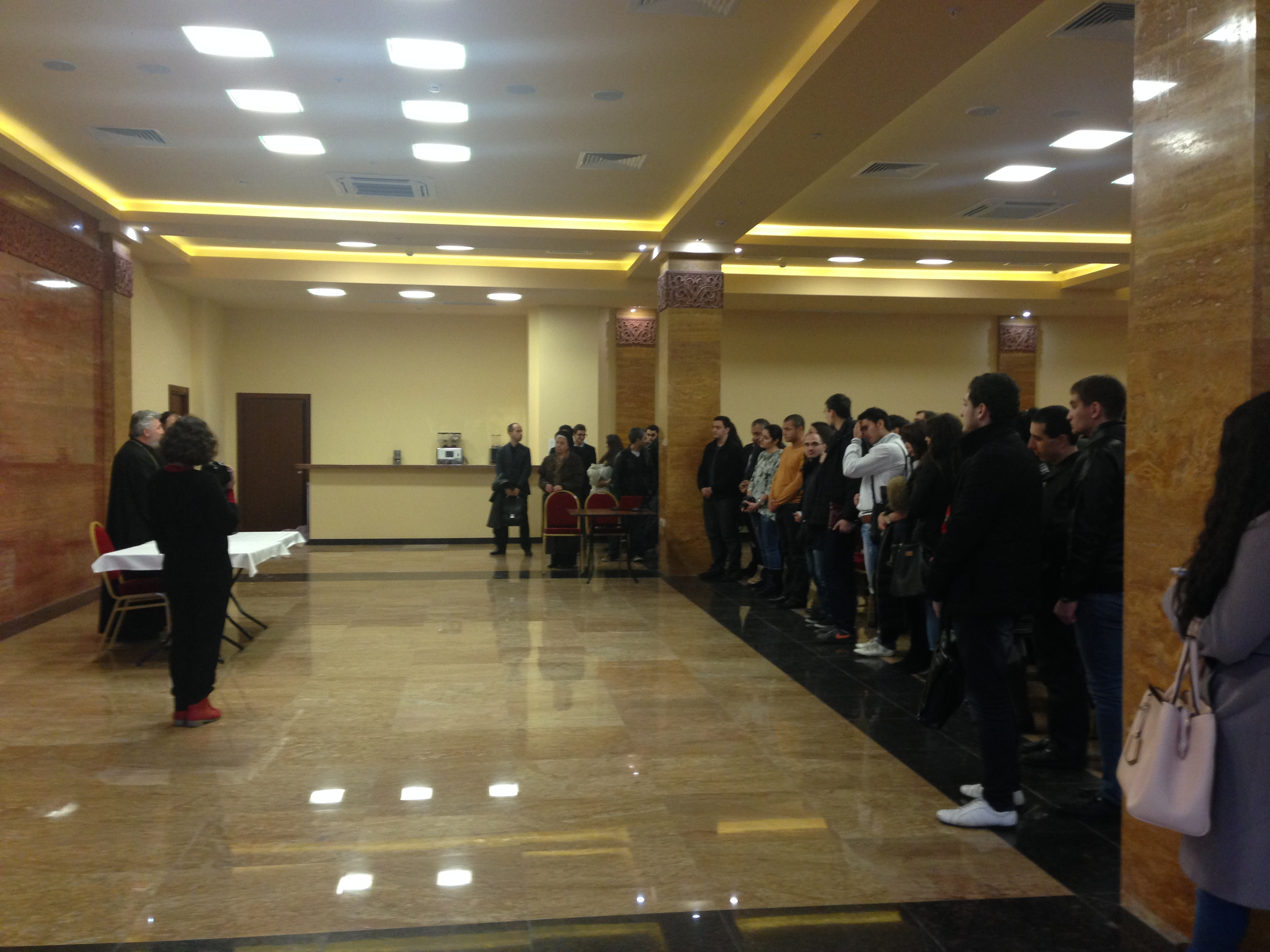 2013 թվականի հոկտեմբերի 27-ին Մոսկվայի հայկական եկեղեցական համալիրի կոնֆերանս դահլիճում: Հանդիպման ավարտը, երբ Մոսկվայի Պետական Համալսարանի ուսանողները Սրբազան Հայրին նկար են նվիրում